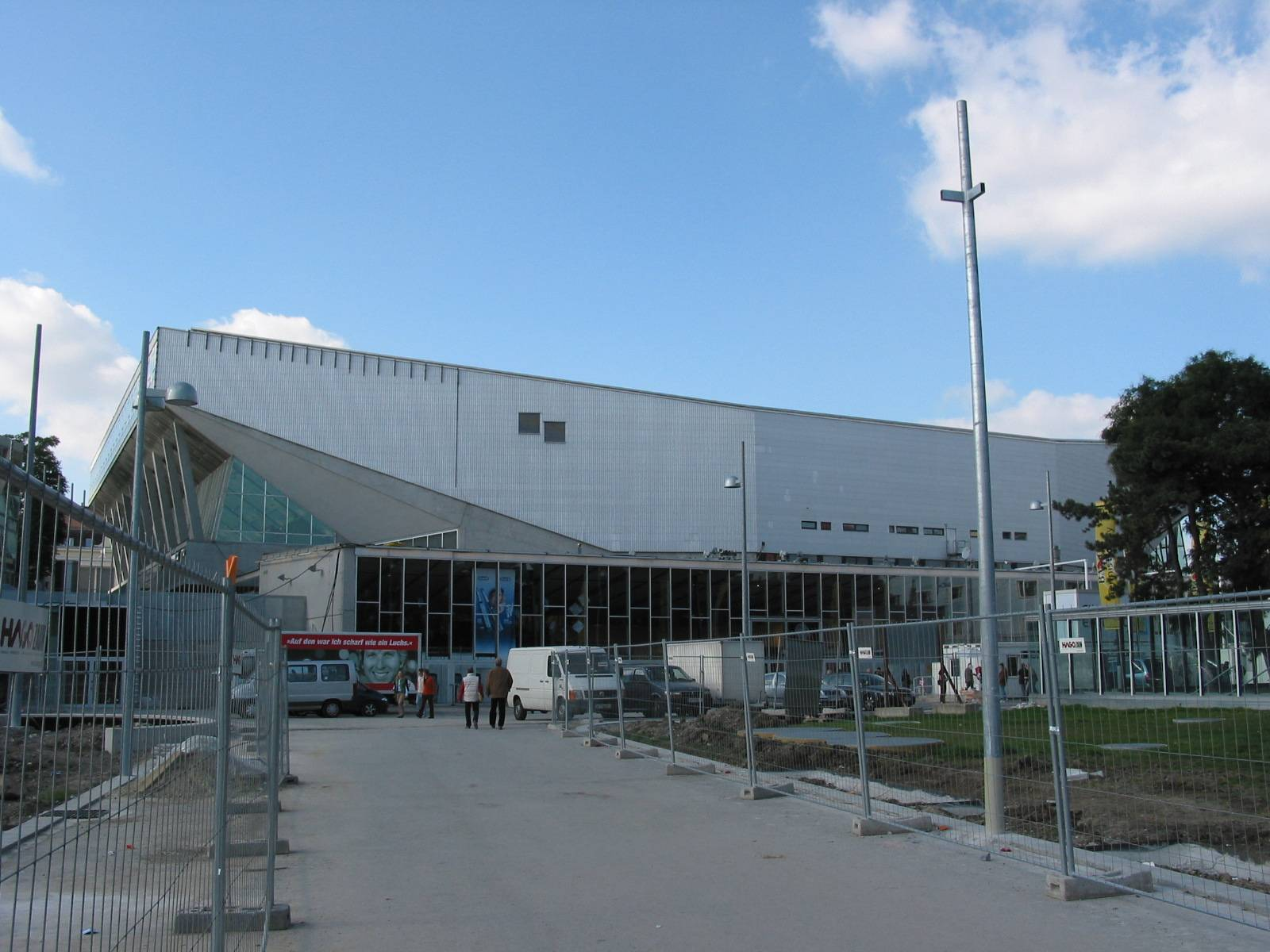 Wiener Stadthalle, Vienna, 2005-10-16 selfmade photo